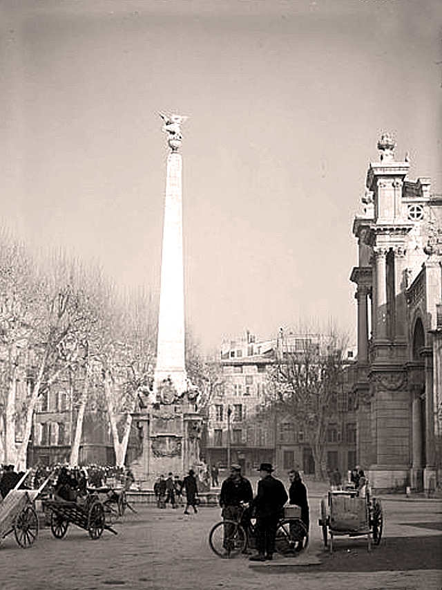 Aix-en-Provence Place des Prêcheurs où fut brûlé Louis Gaufridi en 1611. La fontaine et sa colonne marquent l'emplacement du bûcher